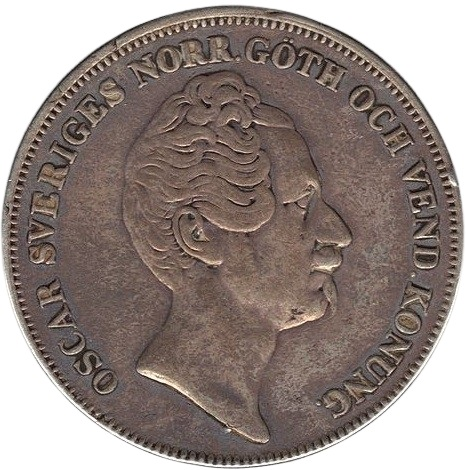 1 Riksdaler Specie 1845, 1